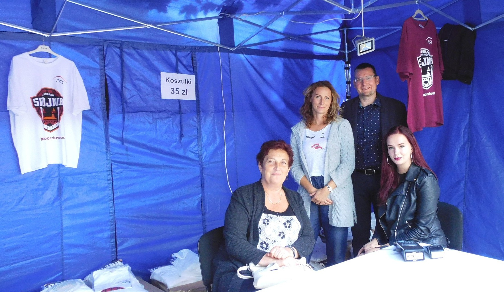 Stargard. 70-lecie Spójni Stargard